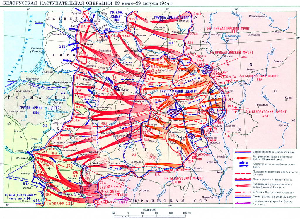 Белорусская операция 1944 год